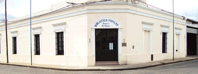 Biblioteca Popular "Rafael de Aguiar", San Nicolás de los Arroyos, Buenos Aires, Argentina